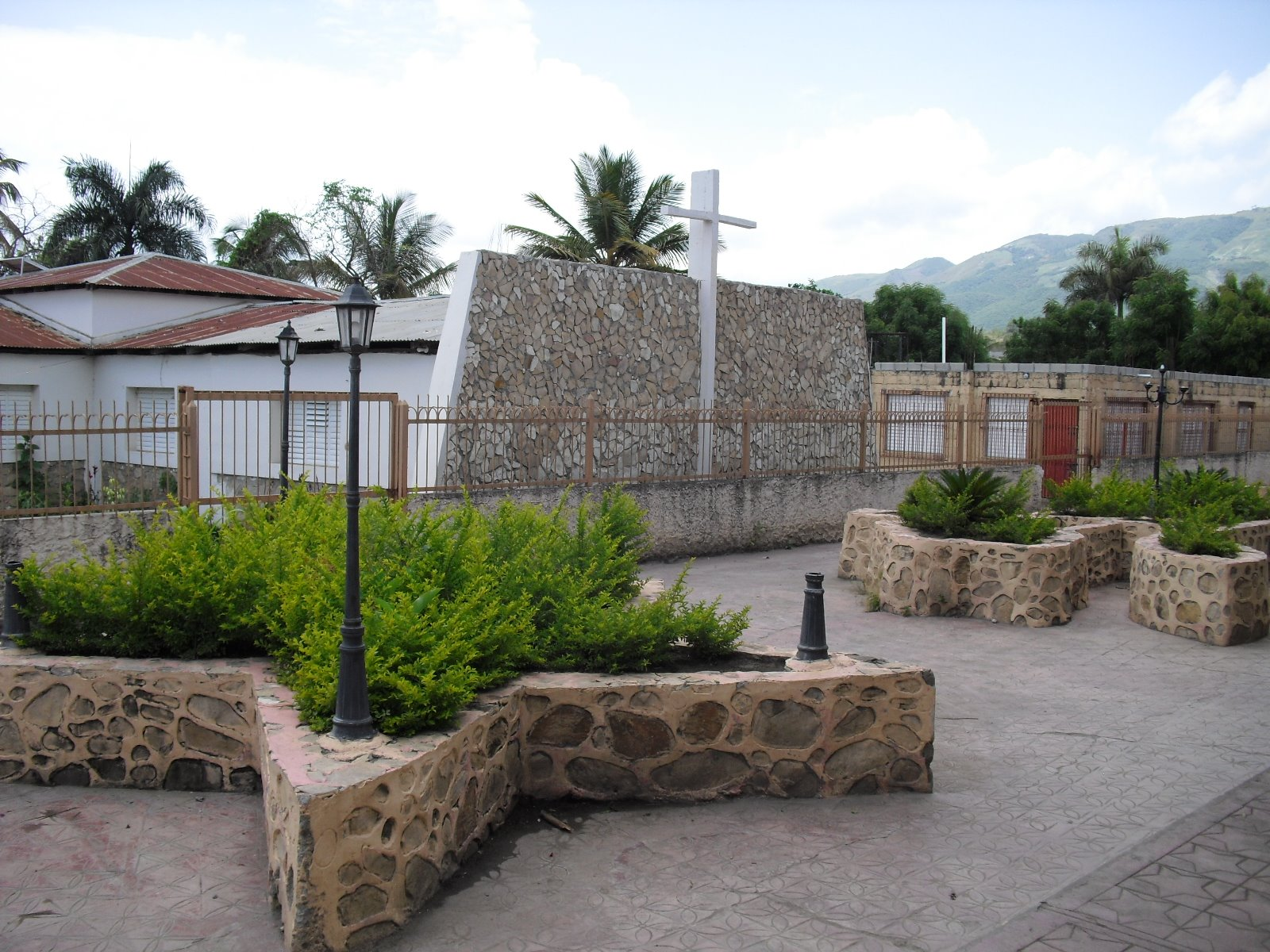 Iglesia Catolica, Obra arquitectonica, Gestion 2006-2010.